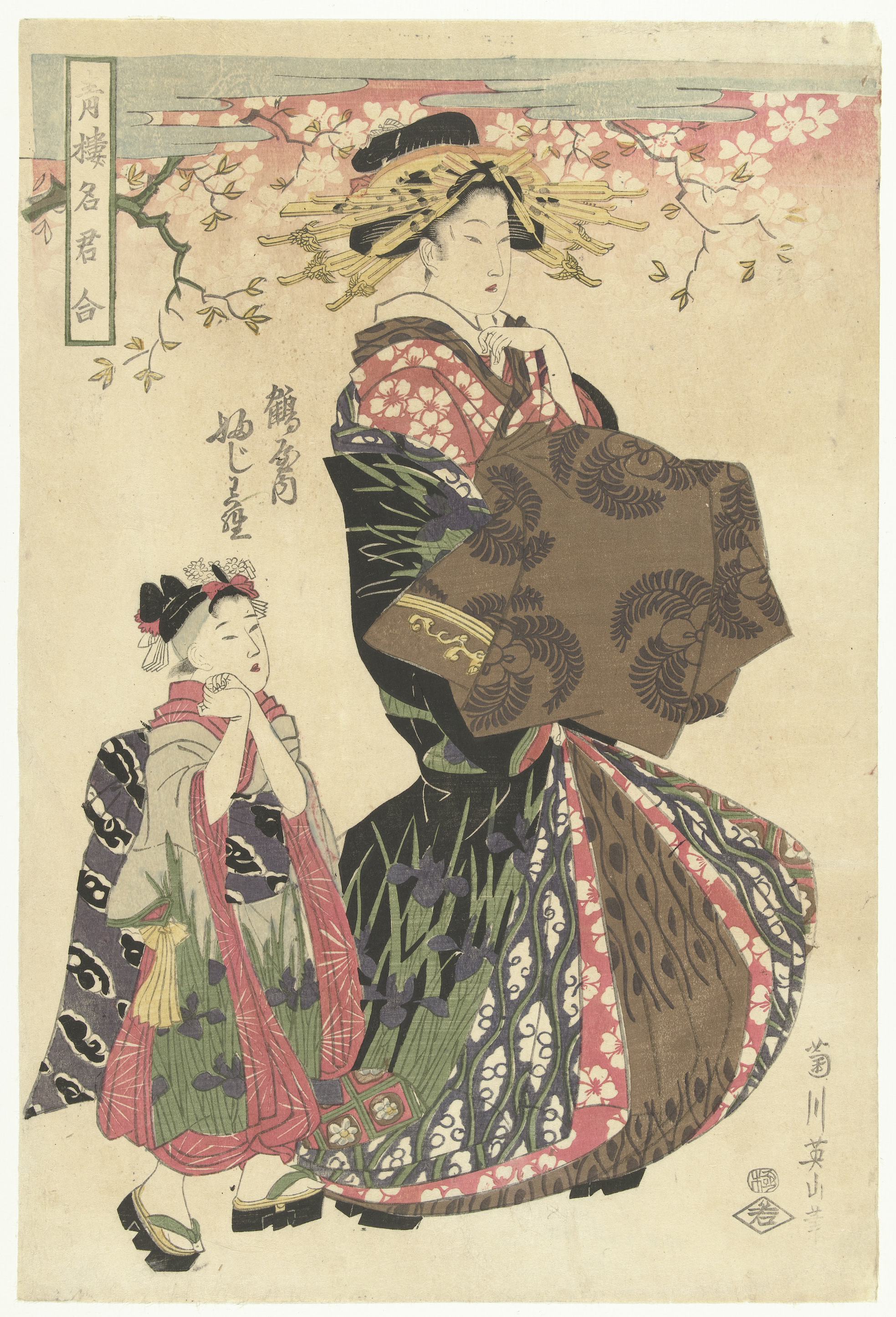 Courtisane en kamuro beiden gekleed in kleurige kimono waarop een patroon van paarse irissen, lopend onder een bloesemtak tegen een roze achtergrond, waarover gestileerde wolken. Label Line: mentioned on object Kikugawa Eizan (1787 - 1867), na 1800 - in of voor 1867, kleurenhoutsnede; lijnblok in zwart met kleublokken Collection: prenten; Japan (collectie)